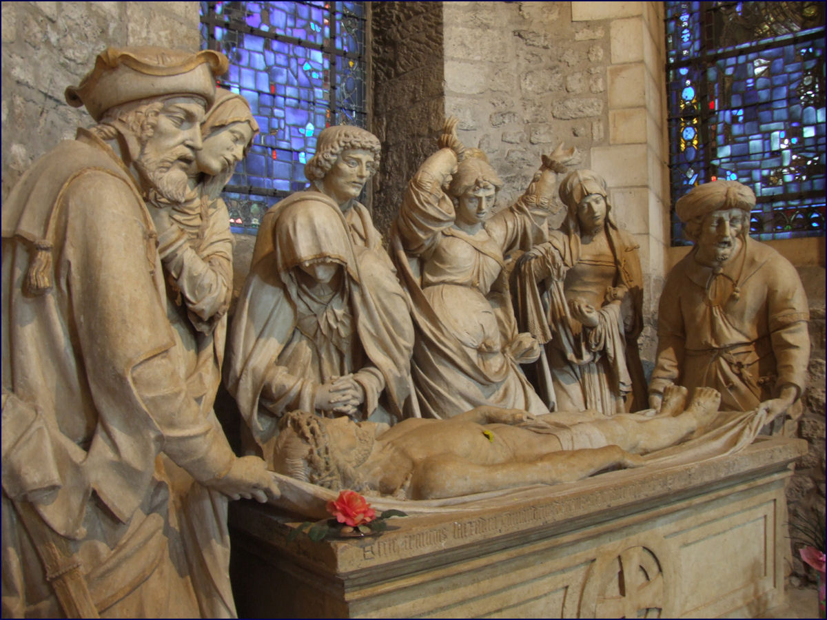 Basilique Saint-Remi (Basilica St. Remigius), Reims, France